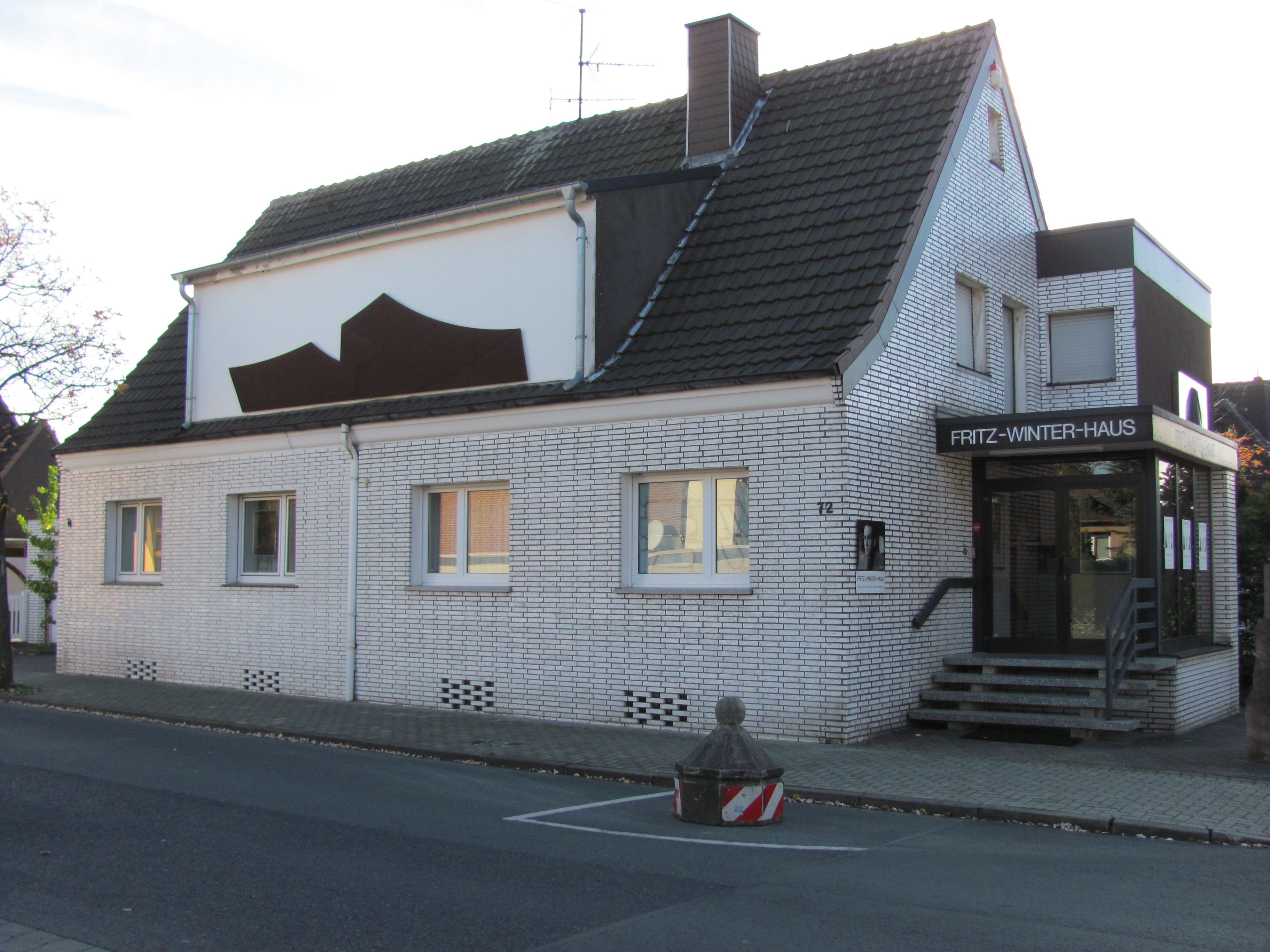 Fritz-Winter-Haus in Ahlen, Vorderansicht